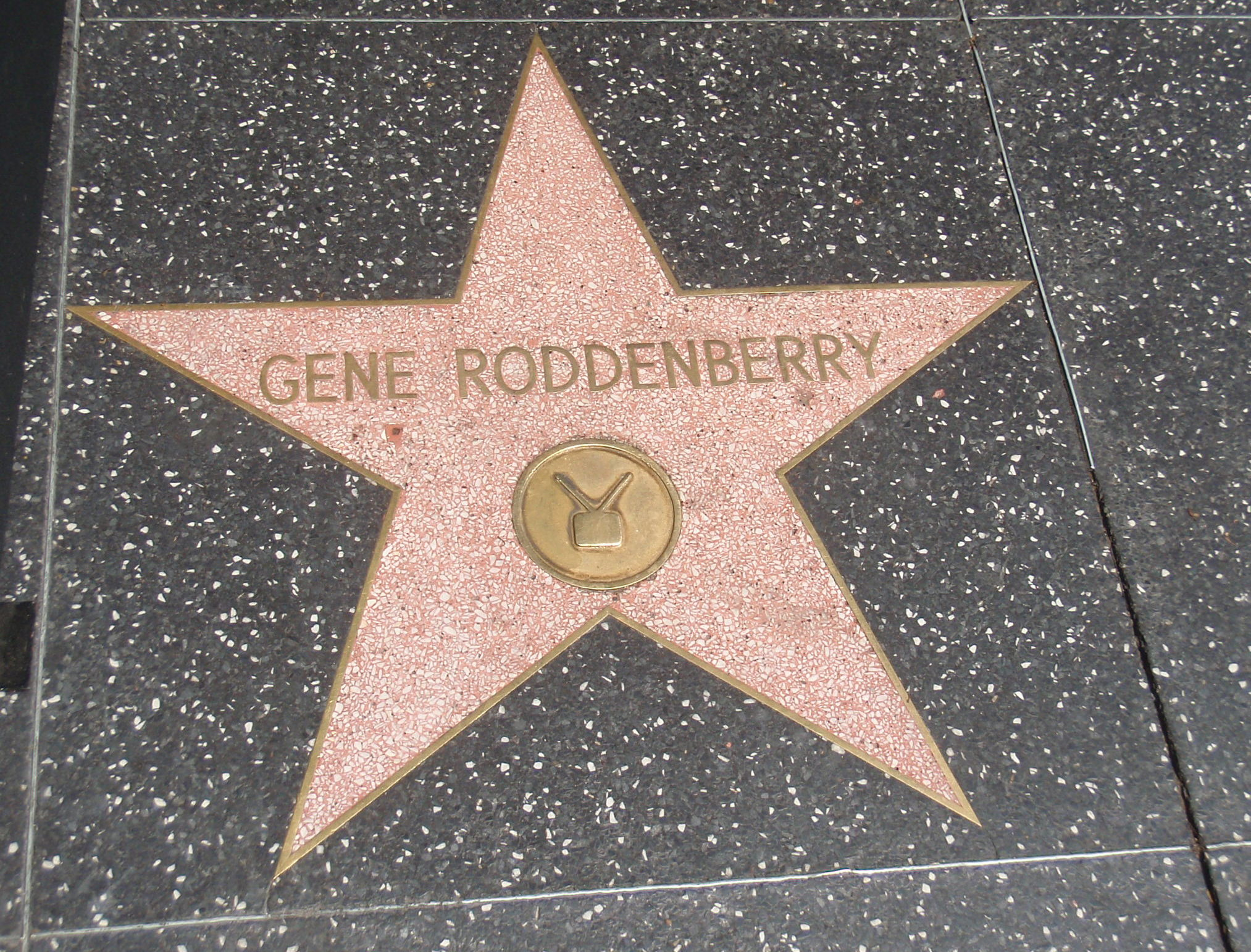 Gene Roddenberry